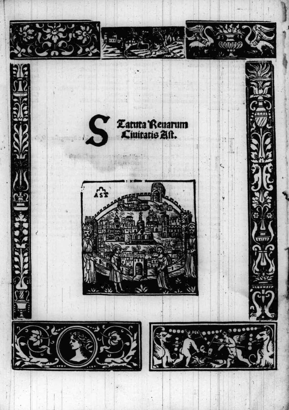 Frontespizio